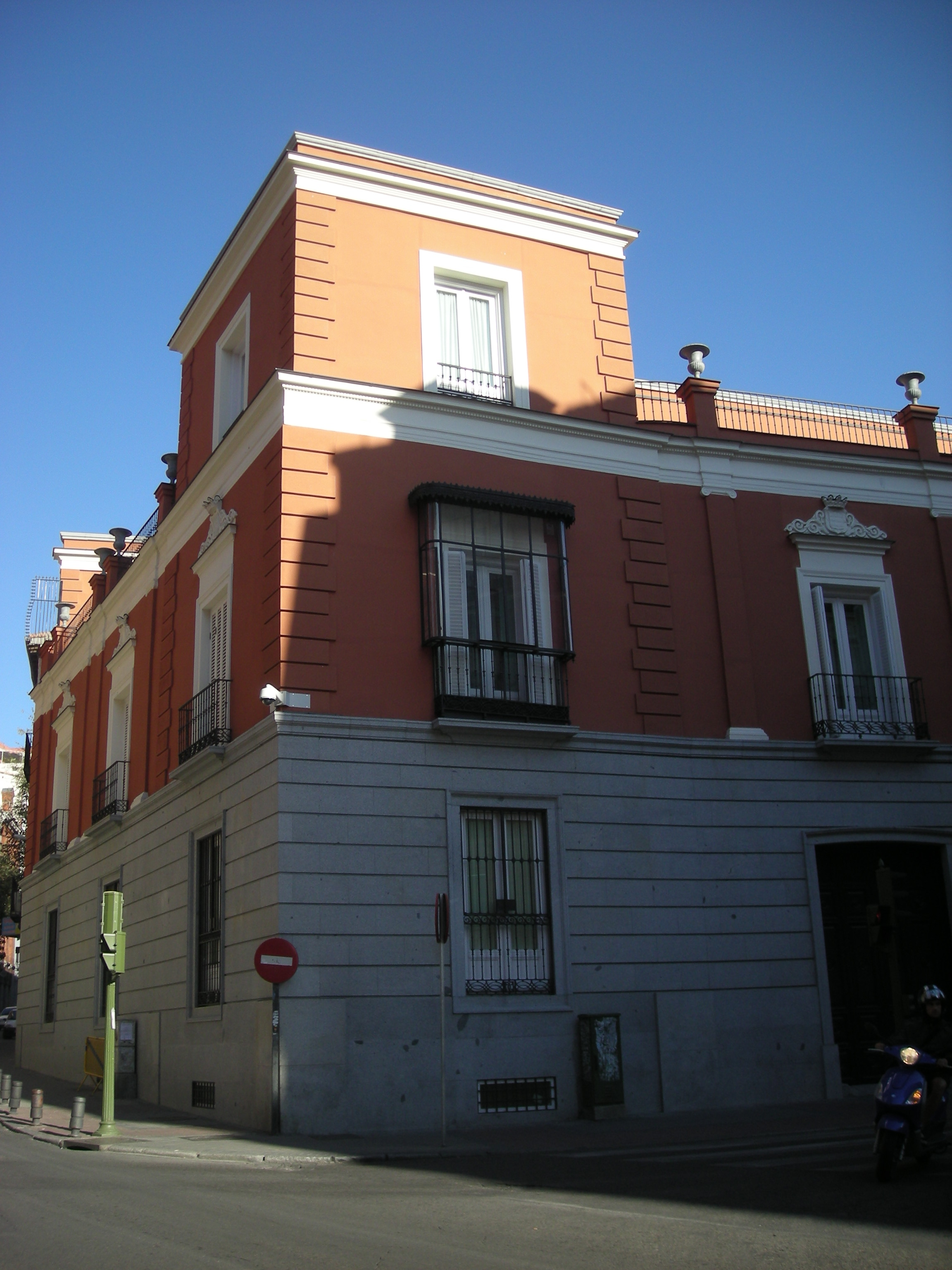 Palacio de Viana; Madrid, España.